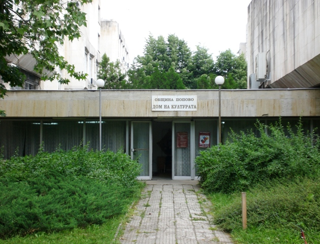 Сградата с офисите на Общински дом на културата в гр. Попово - май 2008 год. Фото: Вл. Стойков